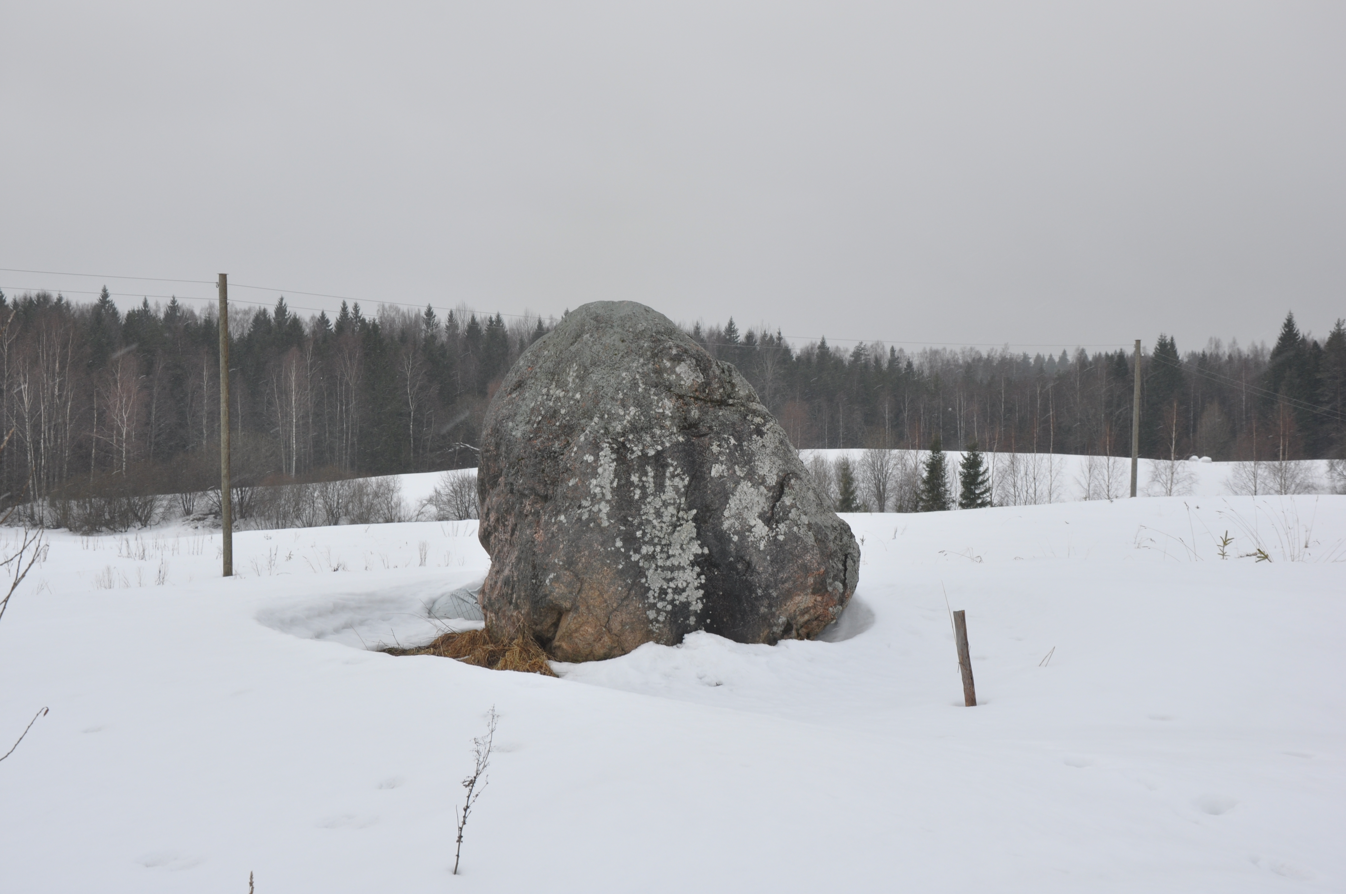 Laukakmens pie ceļa Nītaure - Annas, Nītaures pagasts, Amatas novads, Latvia